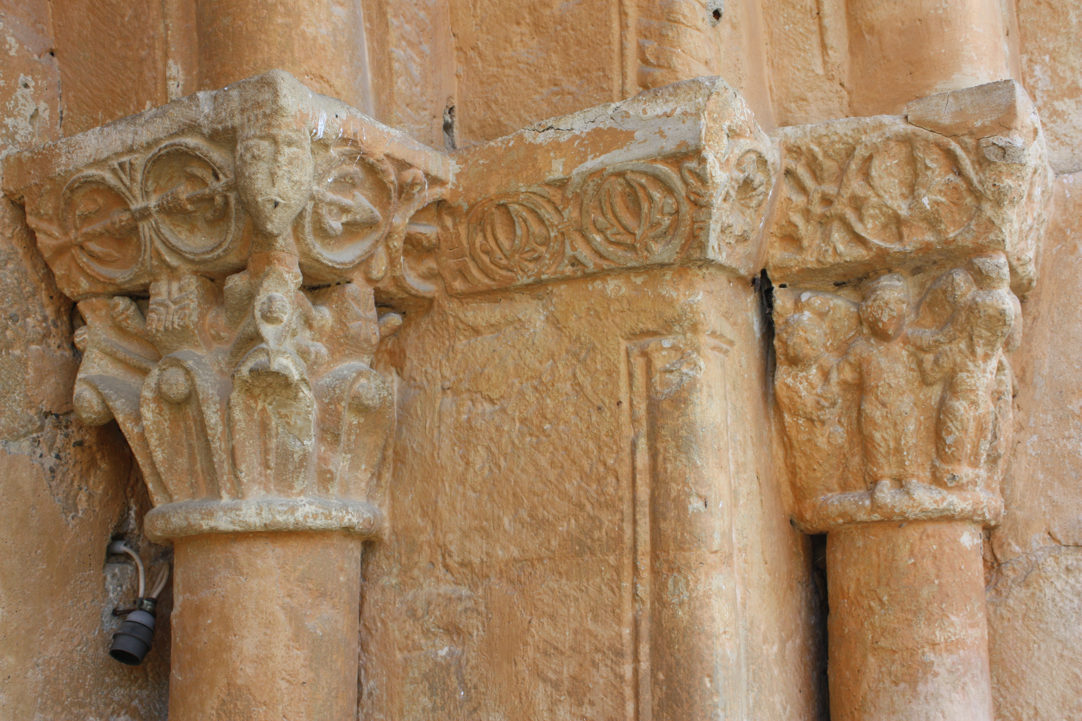 Eglise de Lannecaube, Pyrénées Atlantiques